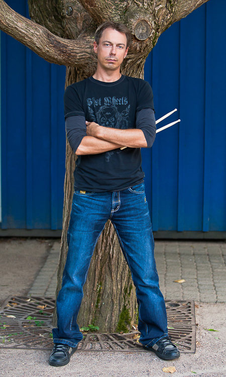 Mika Brushane 2010